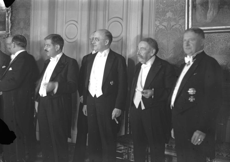 Abschieds-Diner zu Ehren der Reichsregierung in der französischen Botschaft in Berlin ! Eine interessante Ministergruppe im Festsaal der französischen Botschaft, von links nach rechts: der französische Ministerpräsident Laval, Reichskanzler Dr. Brüning, der französische Aussenminister Briand, Reichswehrminister Dr. Groener.